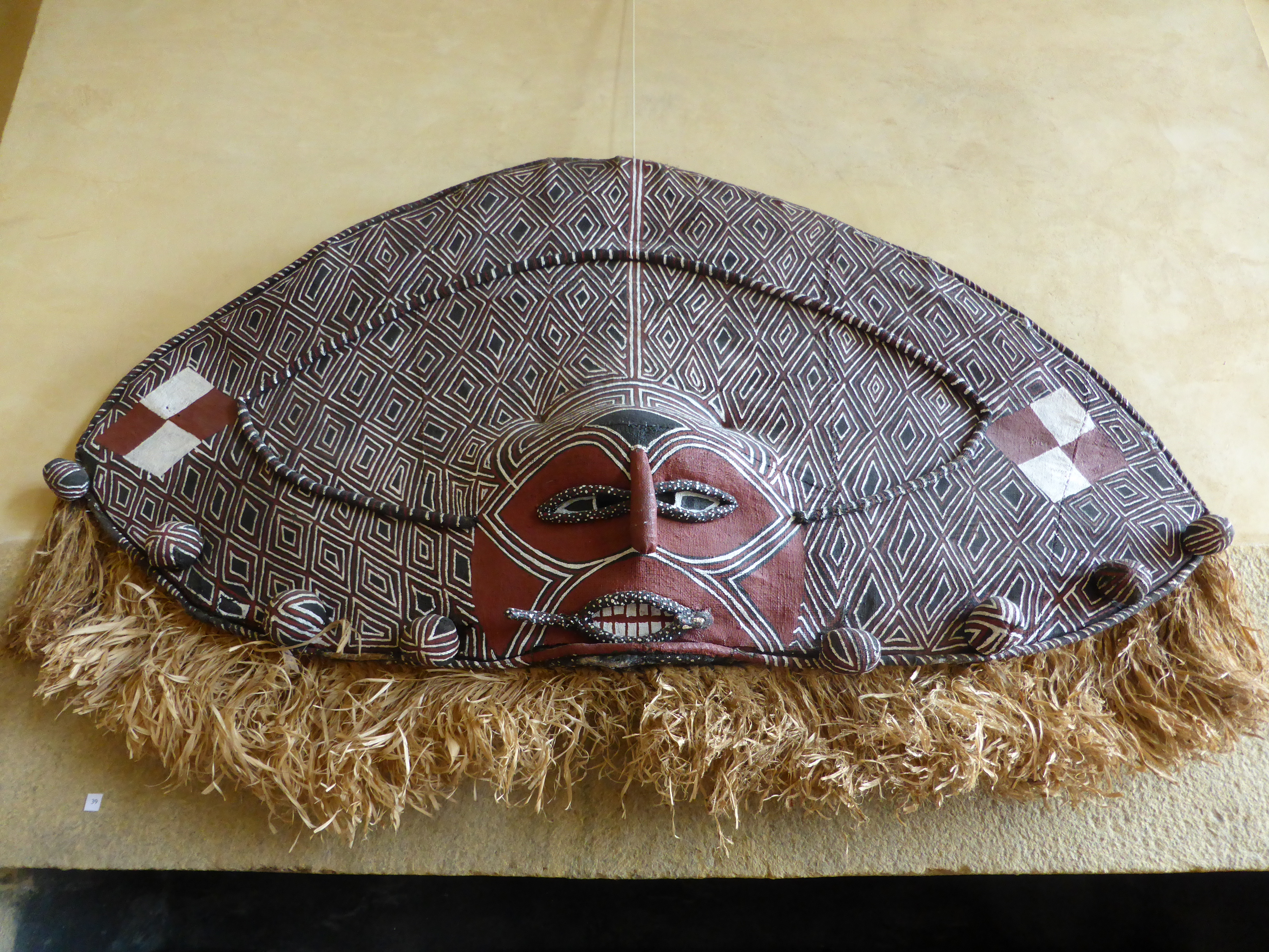 Masque utilisé lors de la mascarade des Makishi, classé au patrimoine culturel immatériel de l'UNESCO